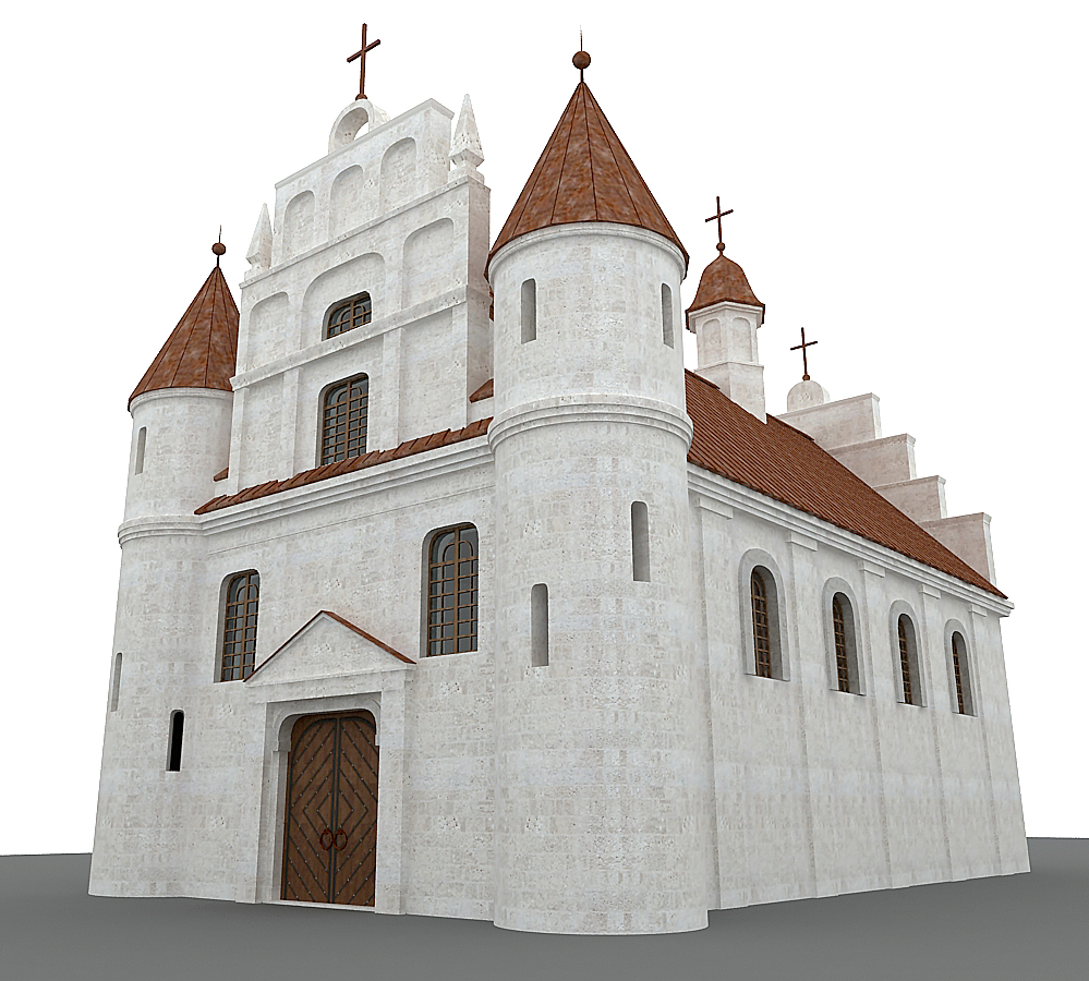 Кафедральний костел Святої Трійці (Луцьк) реконструкція Д.Авраменка